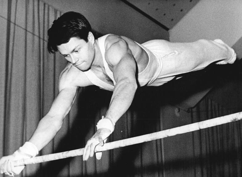 Mathias Brehme Zentralbild Studré 6.12.1967 Berlin: Vorschau - Deutsche Meisterschaften der DDR im Turnen. Bei den Turnmeisterschaften der Männer am 9. und 10.12.1967 in der Berliner Dynamo-Sporthalle hofft Mathias Brehme (SC DHfK Leipzig) - hier am Reck - seinen Meistertitel im Zwölfkampf erfolgreich verteidigen zu können. (Archivfoto)